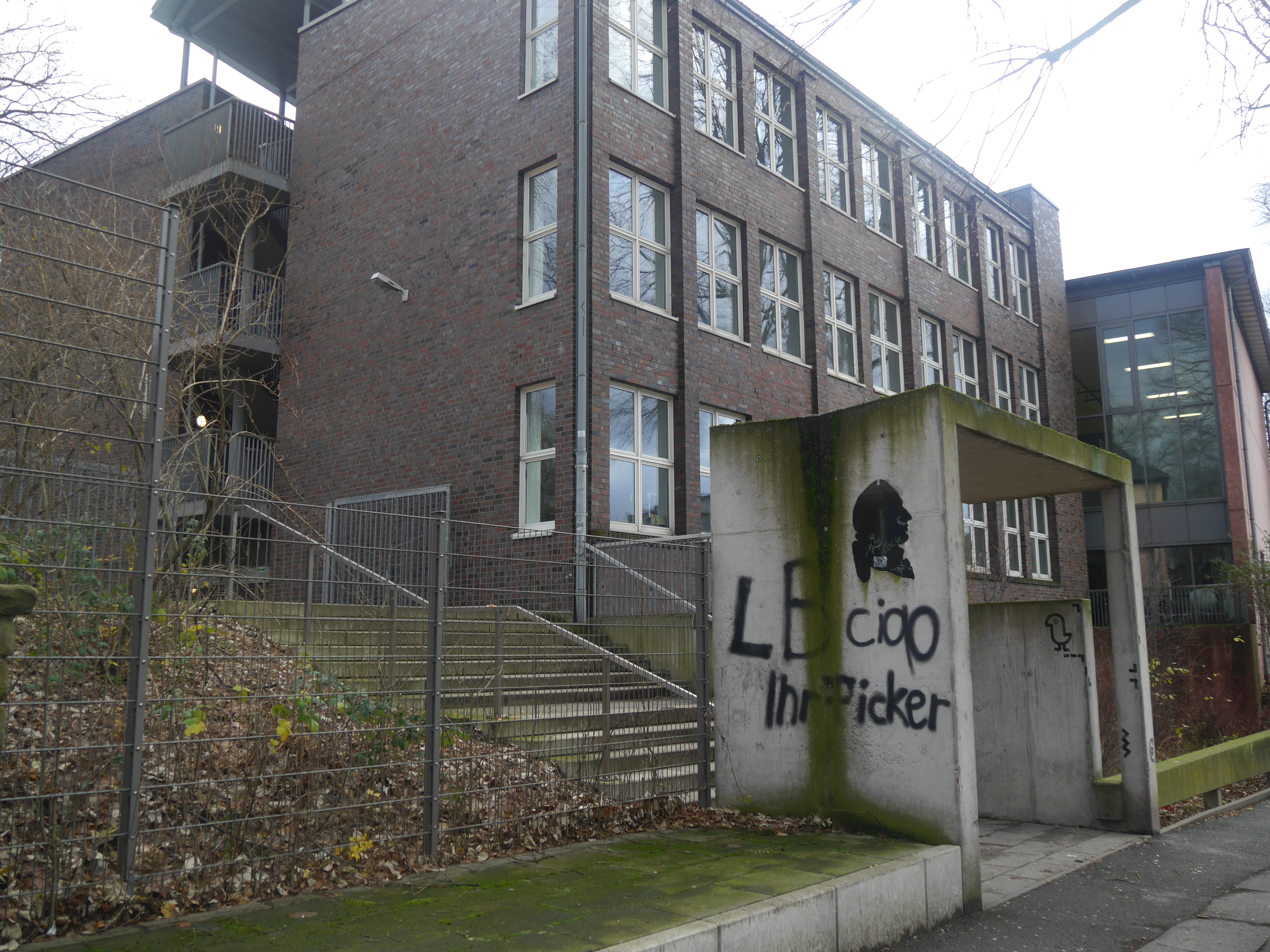 Goethe-Gymnasium Bochum, Ansicht des Eingangs Uhlandstraße mit neuem Oberstufengebäude, im Hintergrund das Gebäude der neuen Turnhalle.